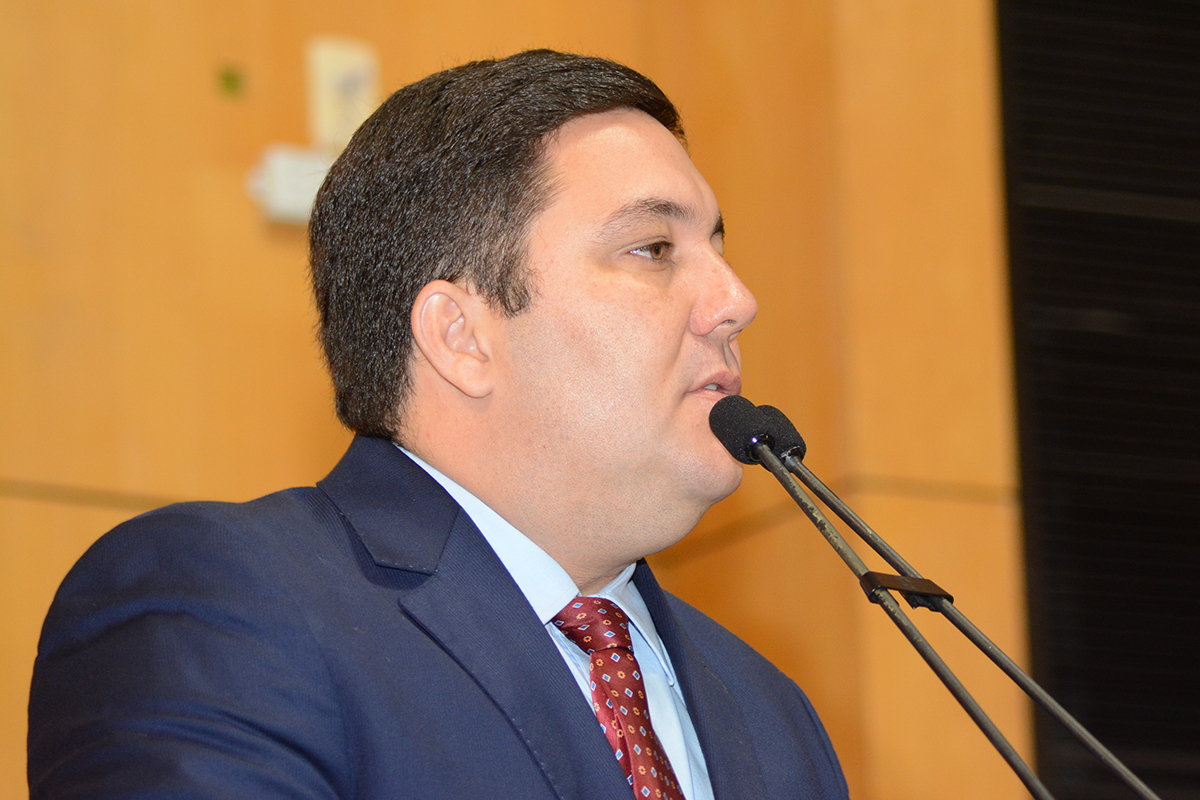 Foto: Tonico